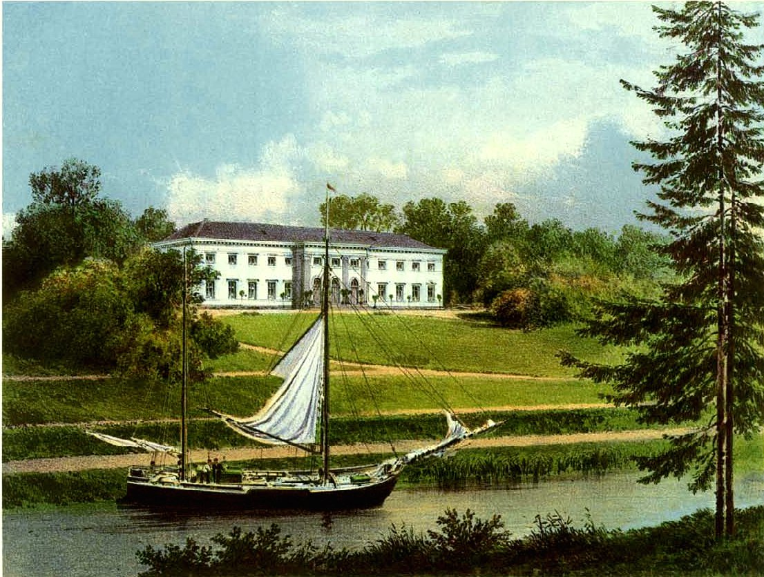 Gut Knoop